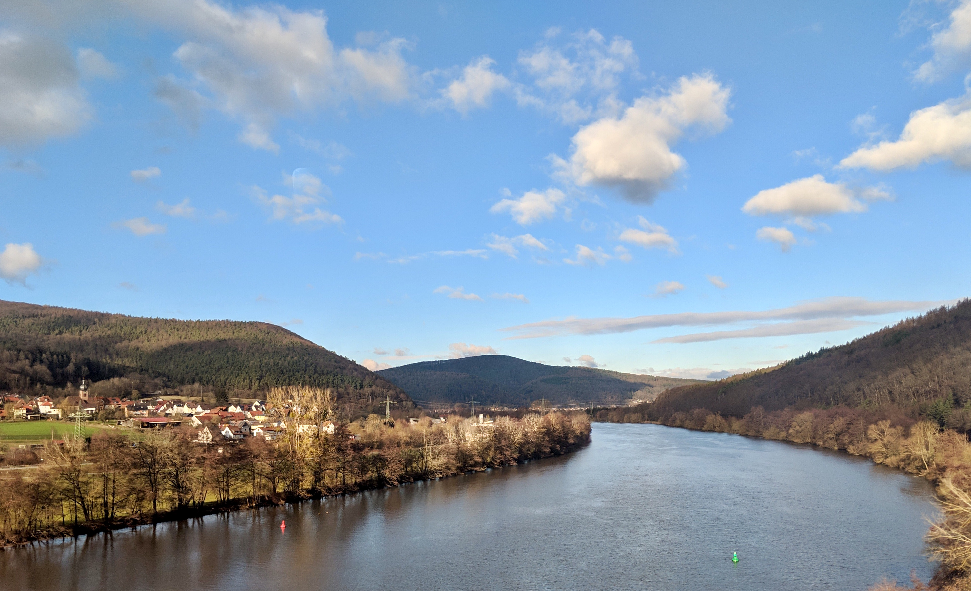 Fotografiert aus dem Zug heraus, der gerade die Brücke südlich des Orts passiert.